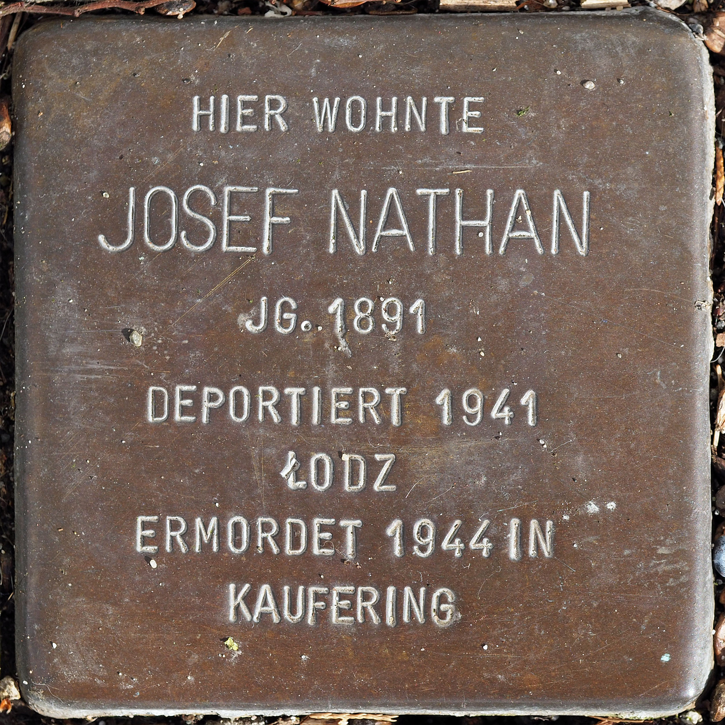 Stolperstein DU: Nathan, Josef